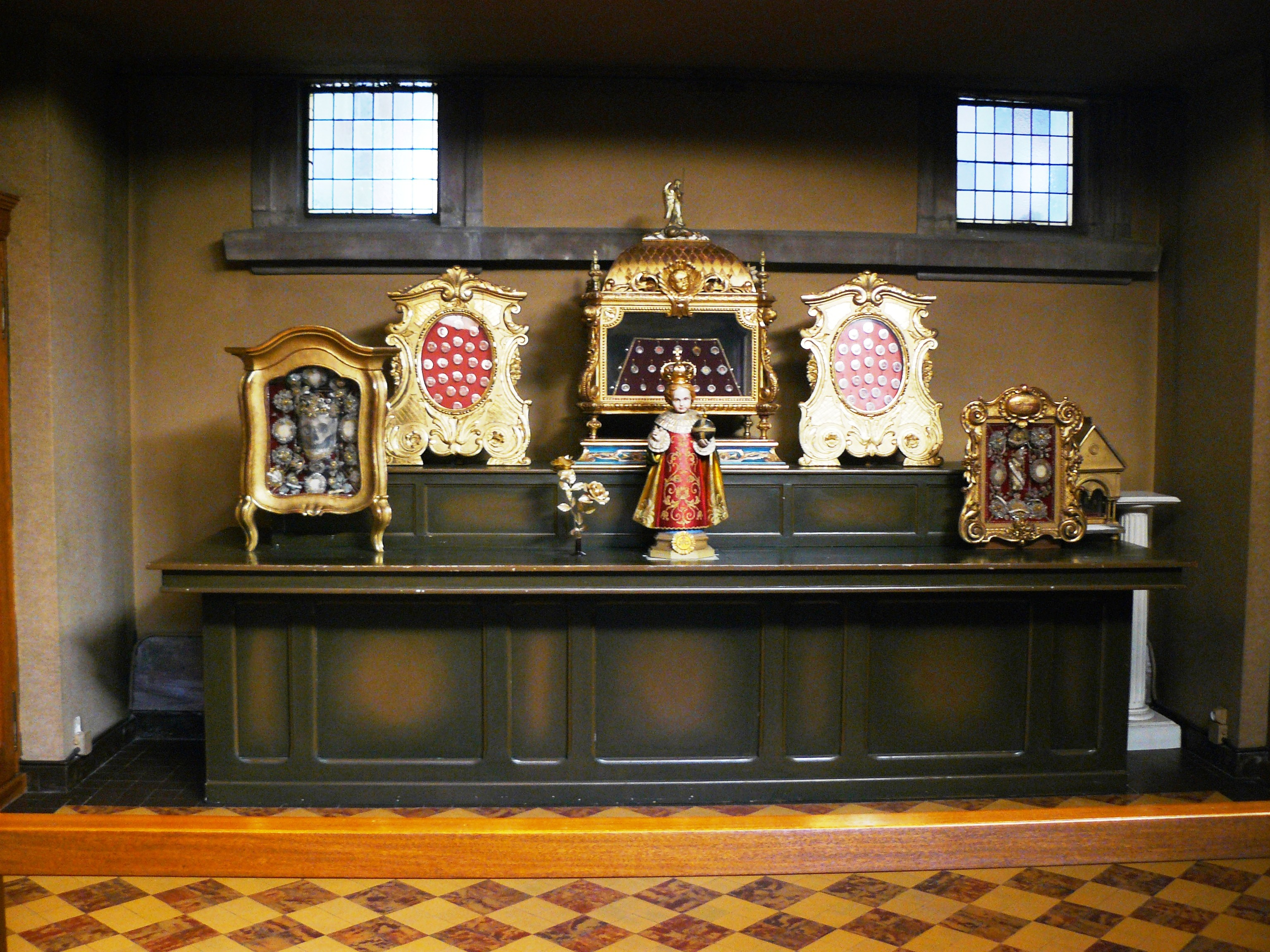 Chapelle du Bon Pasteur au Prieuré de Thierenbach (Haut-Rhin).